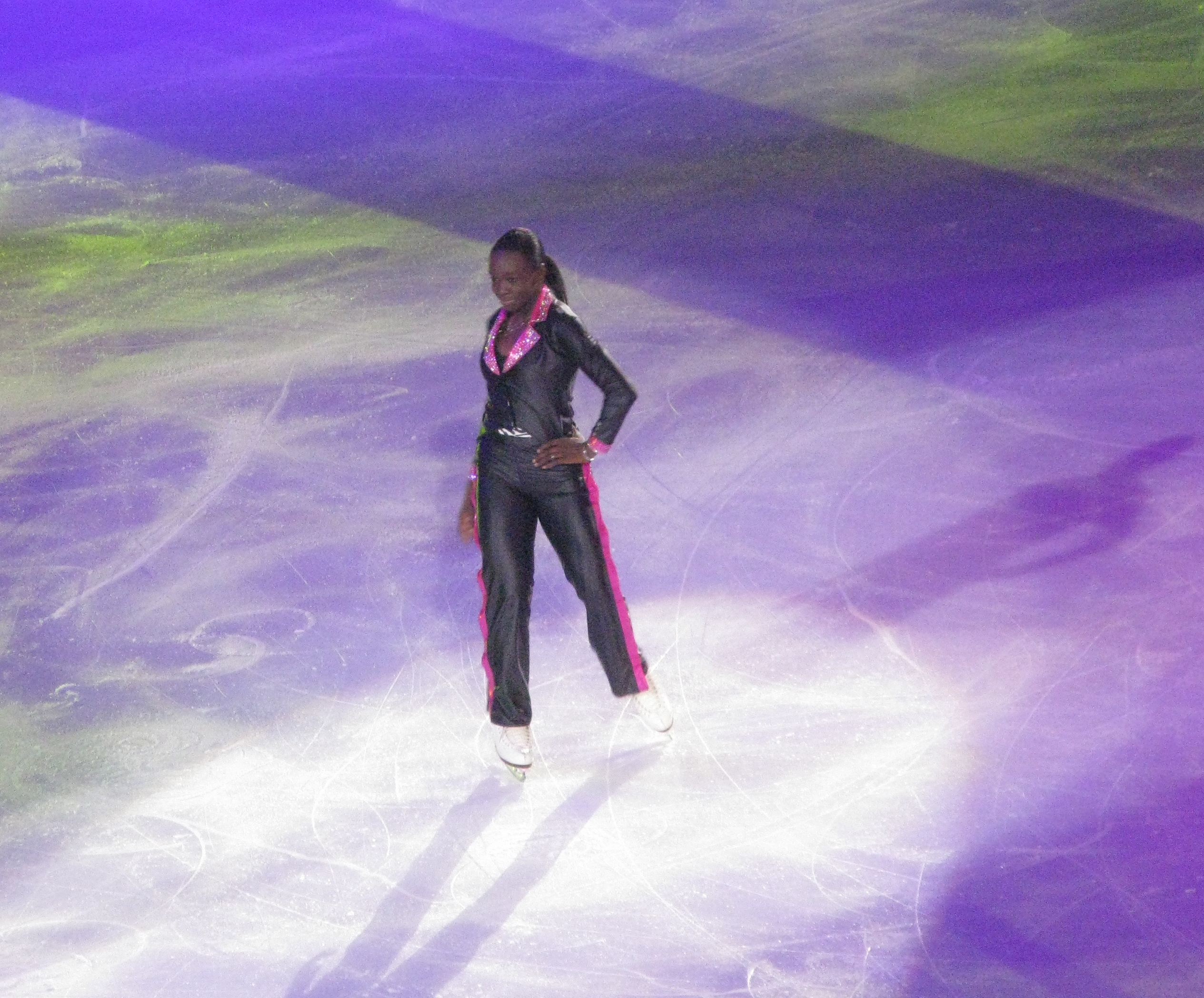 Maé-Bérénice Méité, Gala des champions, Trophée Eric Bompard 2010, Paris